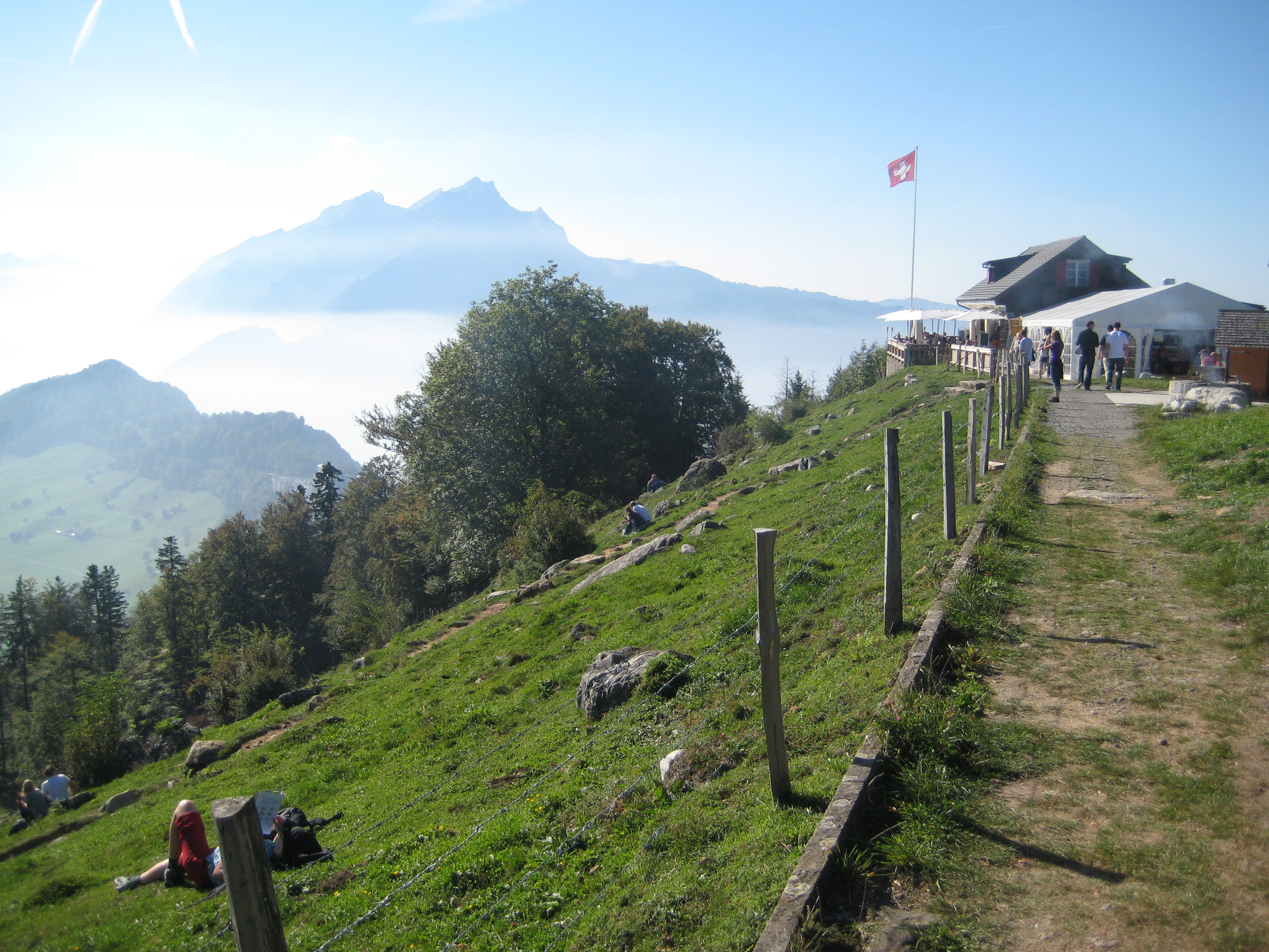 Bürgenstock-Gipfel mit Restaurant, im Hintergrund der Pilatus